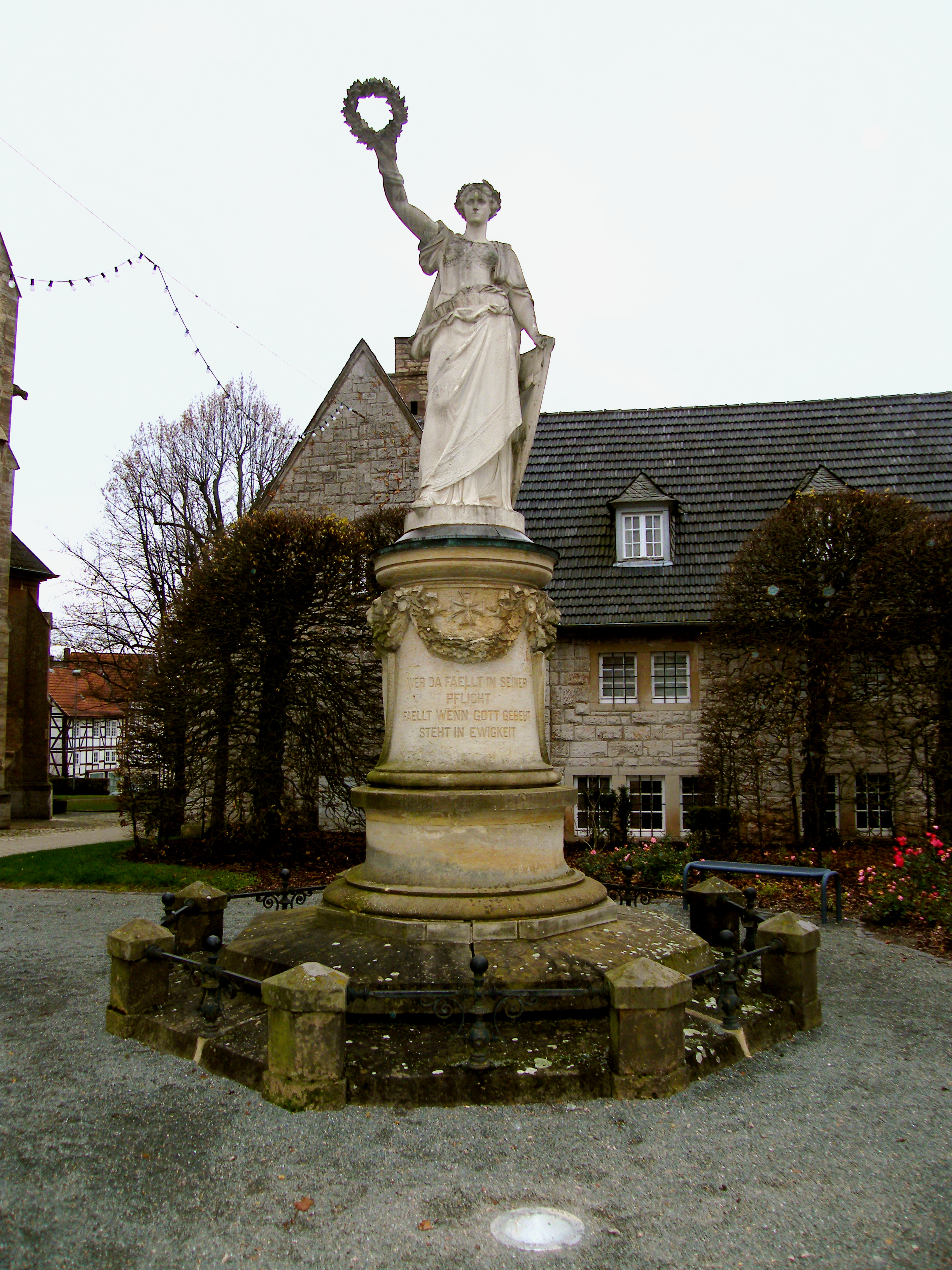 Korbach - Waldeccia - Siegesstatue aus der Kaiserzeit - Eingeweiht am 2. September 1887 (Sedanstag), siehe [1]. Entwurf: Ernst Paul (1856–1931), Standort: Vor der Kilianskirche.